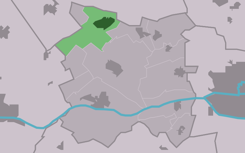 Kaartsje fan himrik fan Berltsum